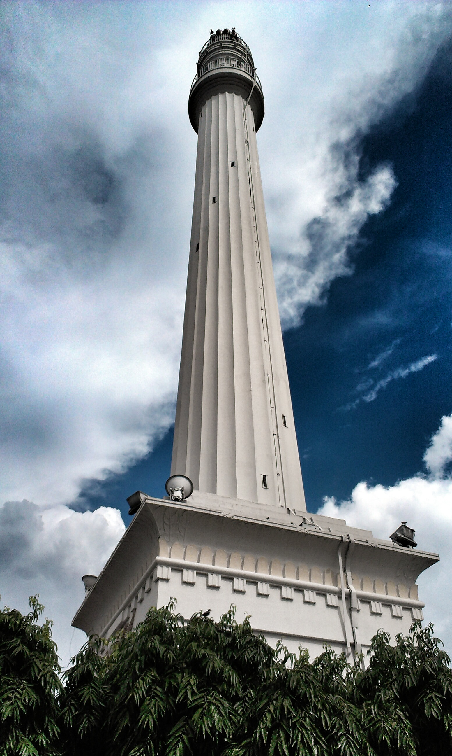 Shaheed Minar, Kolkata, India